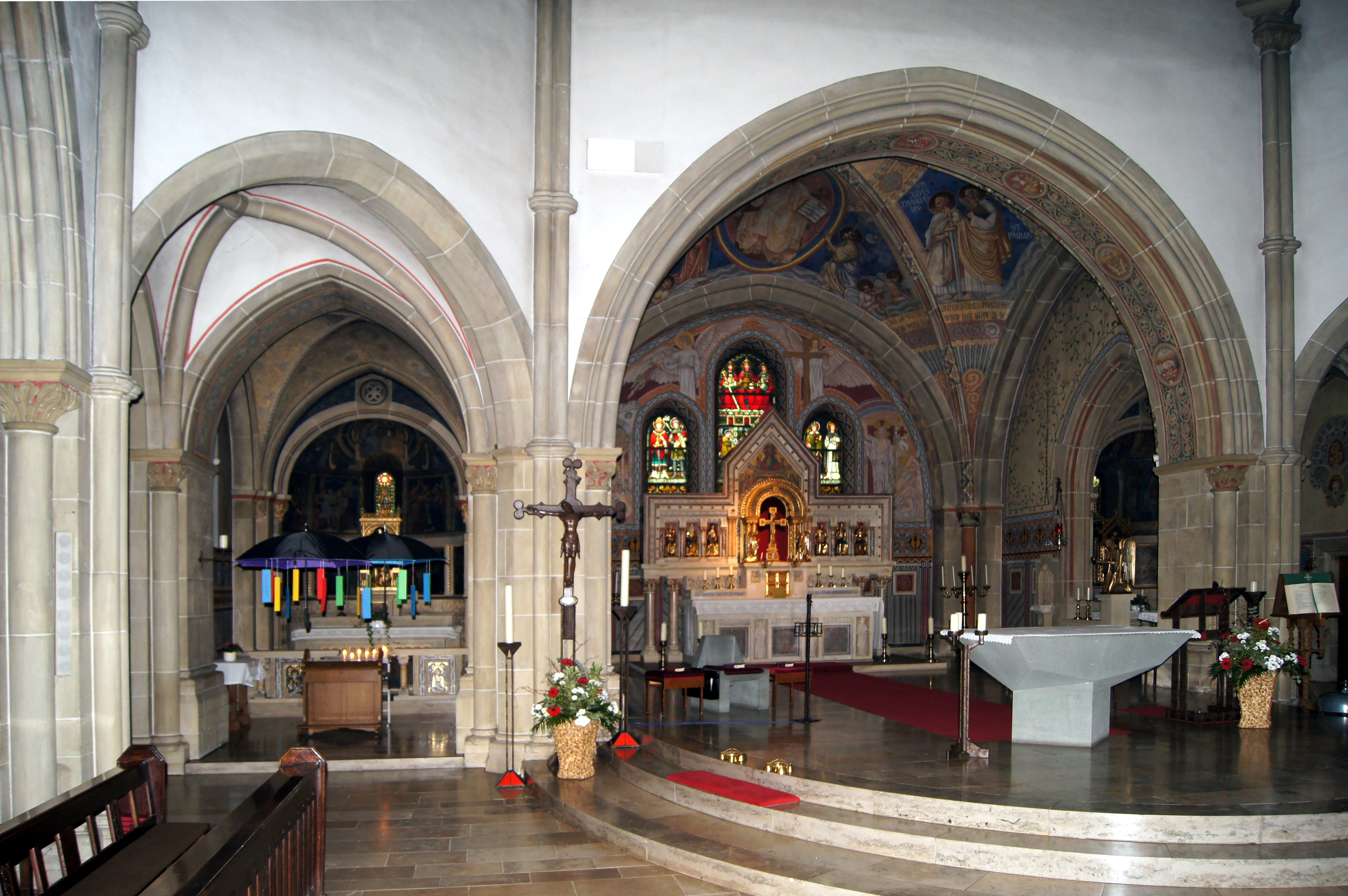 Altarraum der Pfarrkirche St. Fabian und Sebastian im münsterländischen Osterwick.